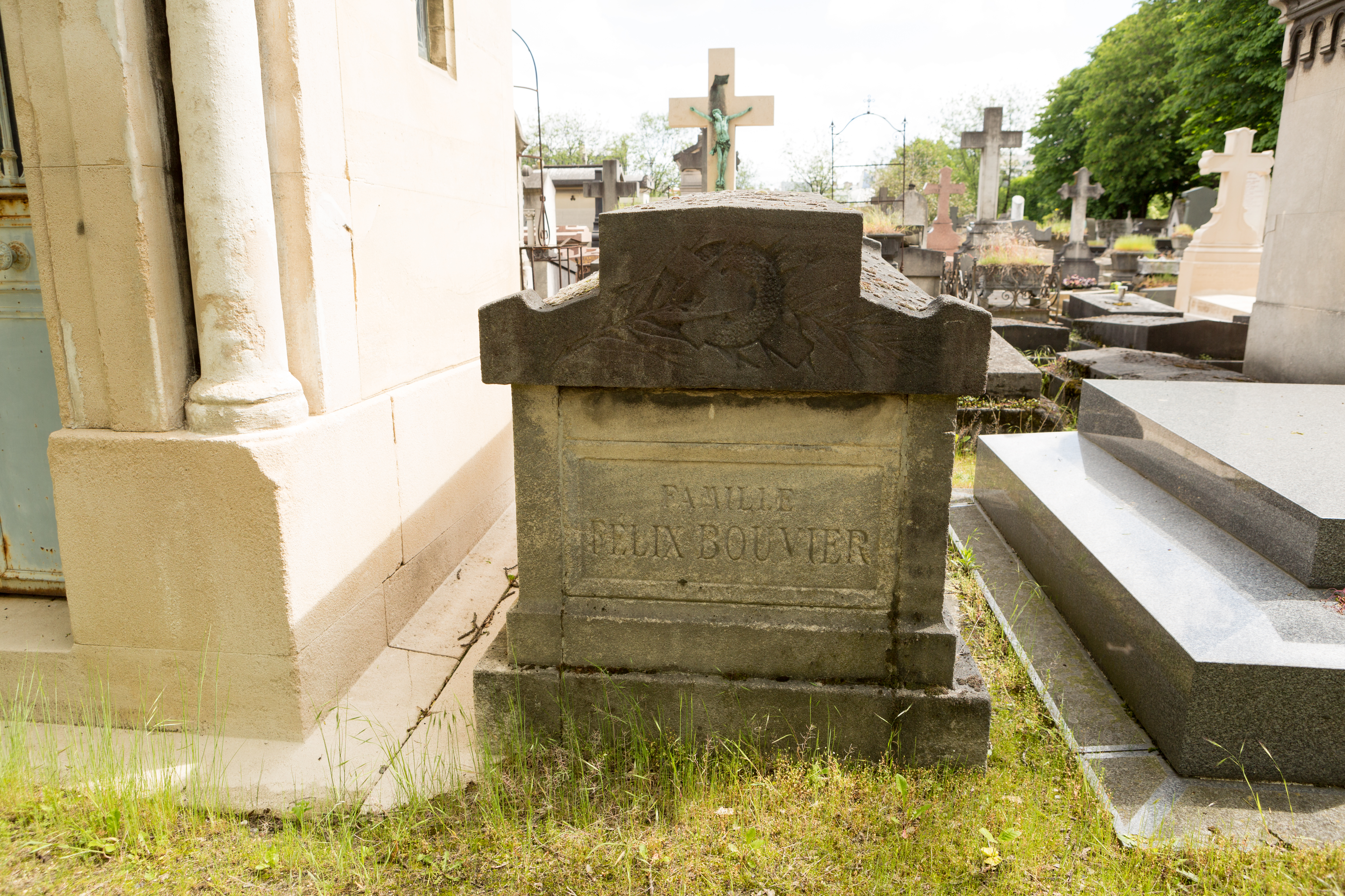 Sépulture de Félix-Bouvier (1853-1910), chef adjoint du ministre de l'agriculture, chef de bureau à l'administration des finances, membre du comité de la Société de l'histoire de la Révolution française, chef de bureau chevalier de la légion d'honneur, connu pour ses travaux en histoire ; Marcel Héraud (1883-1960), avocat et député.